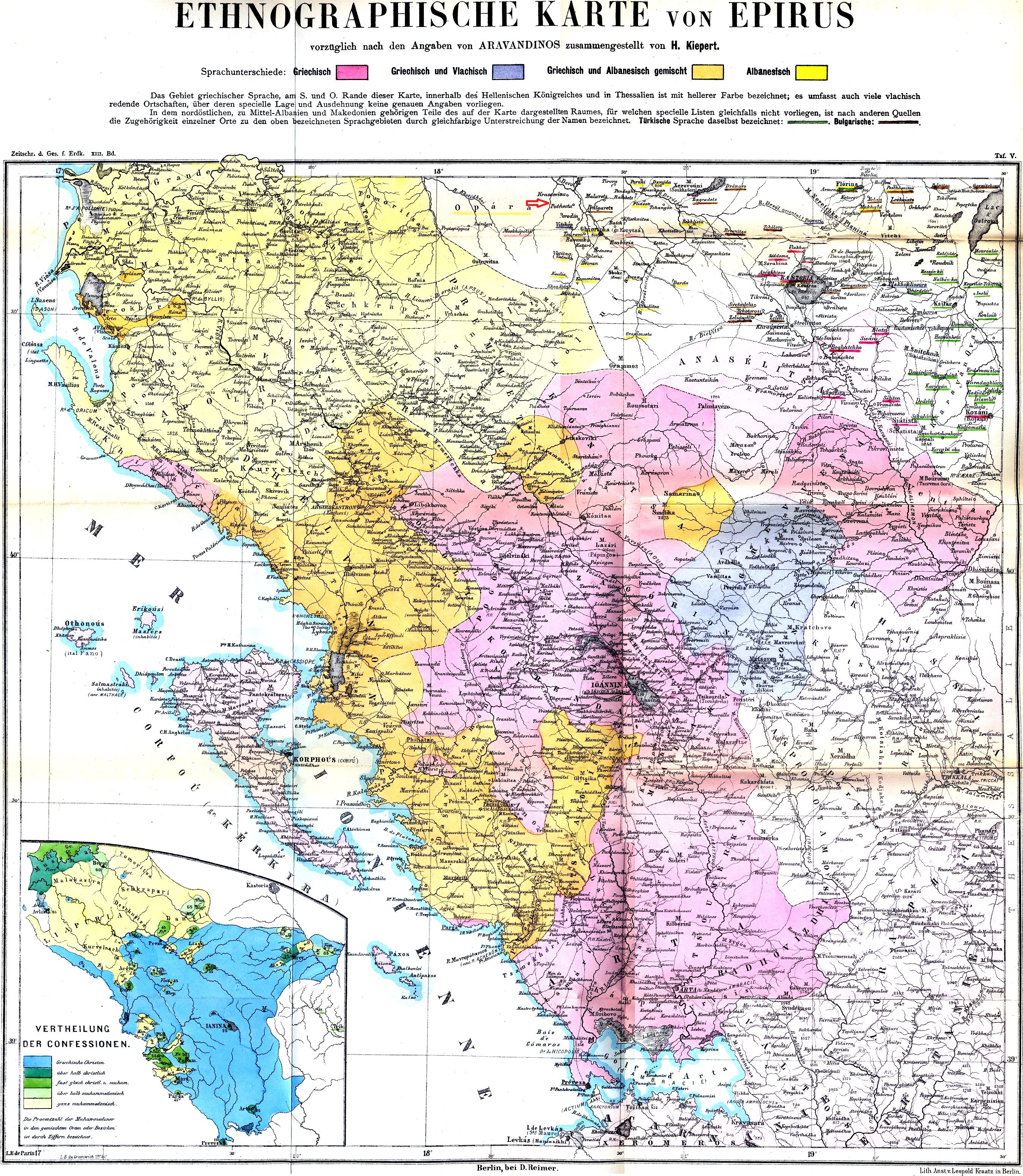 Pocesta